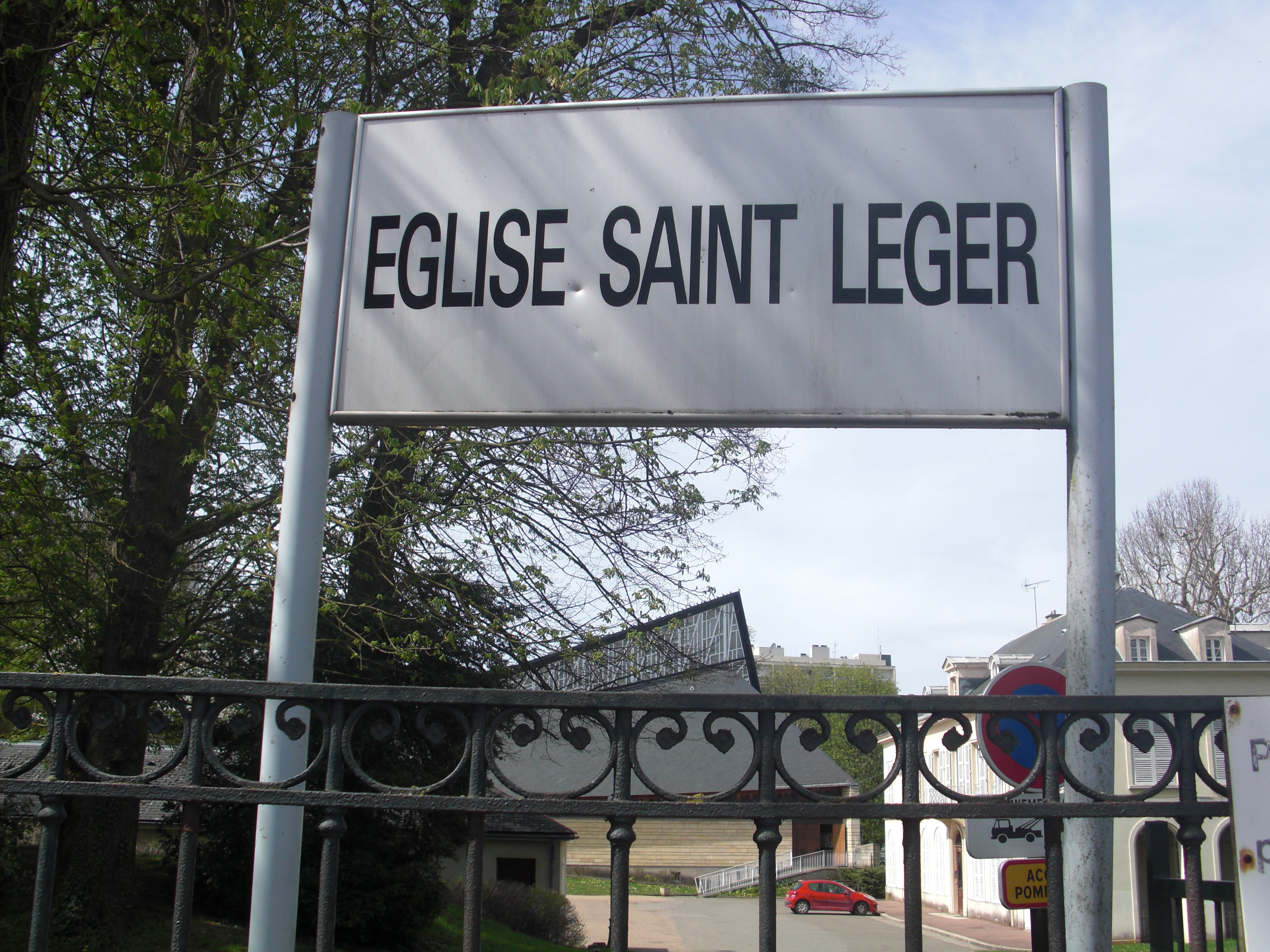 Entrée de l'église Saint-Léger de Saint-Germain-en-Laye, 17 avril 2013